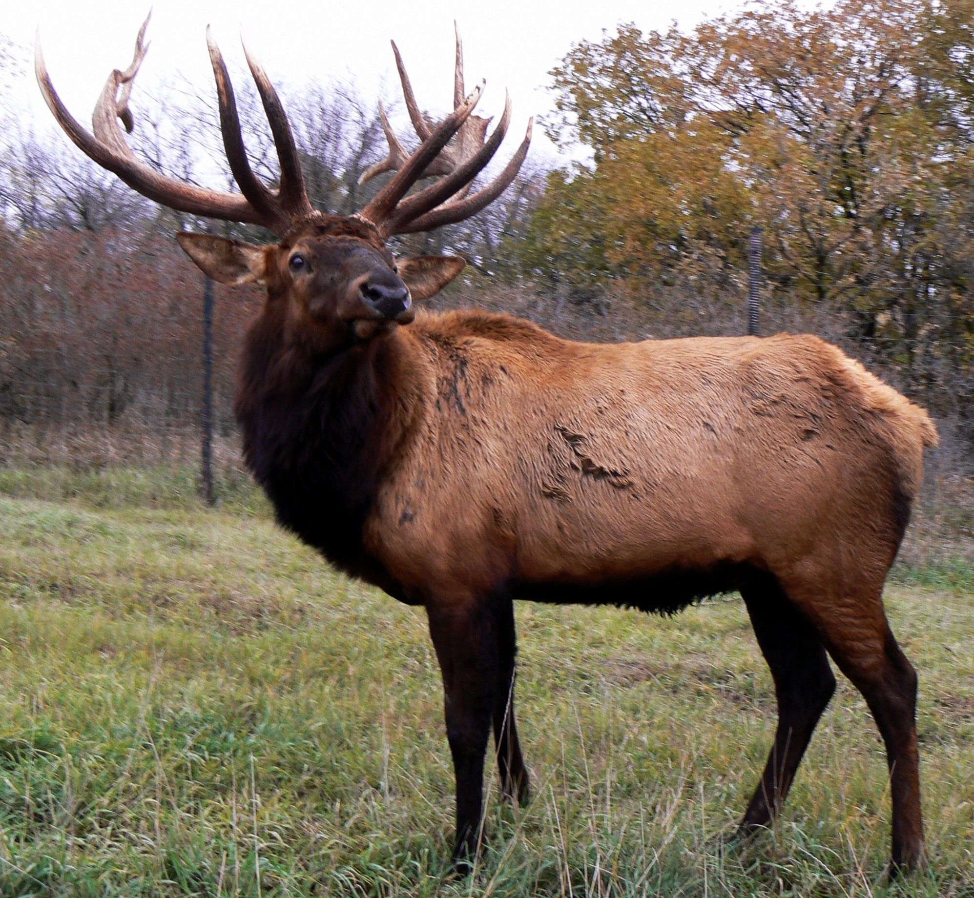 Bull Elk (Cervus canadensis)